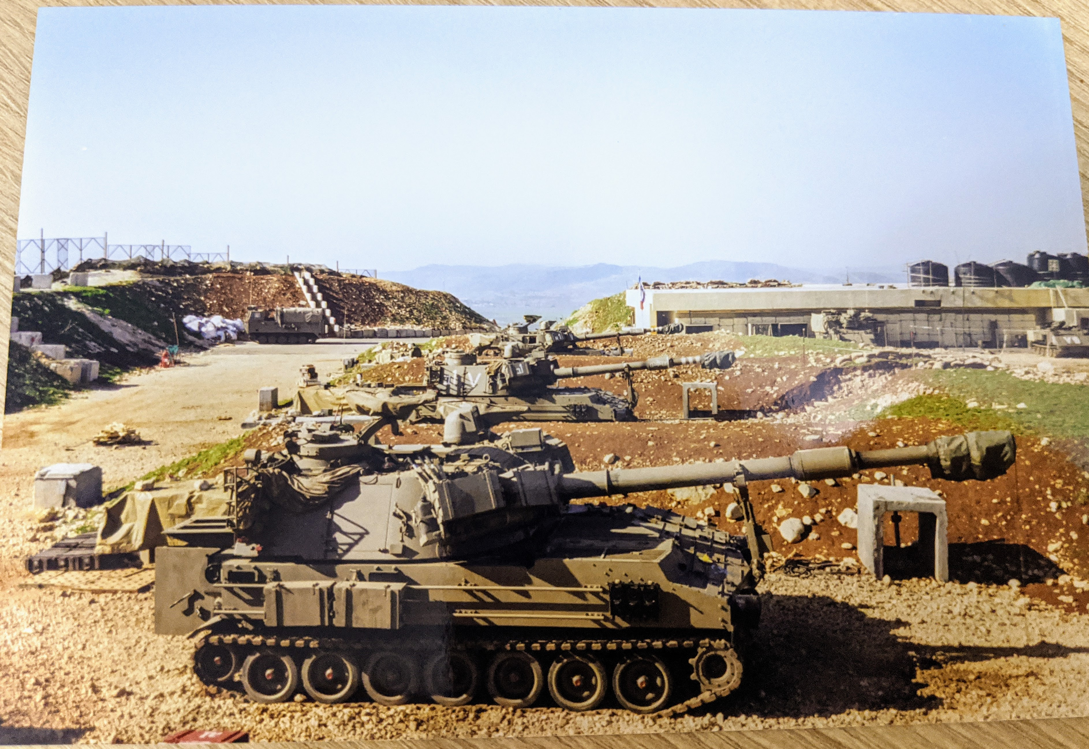 מוצב שרייפה סוללת ארזים גדוד 403.